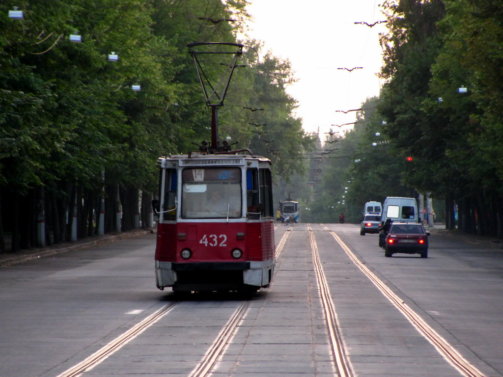 Трамвай в Кривом Роге